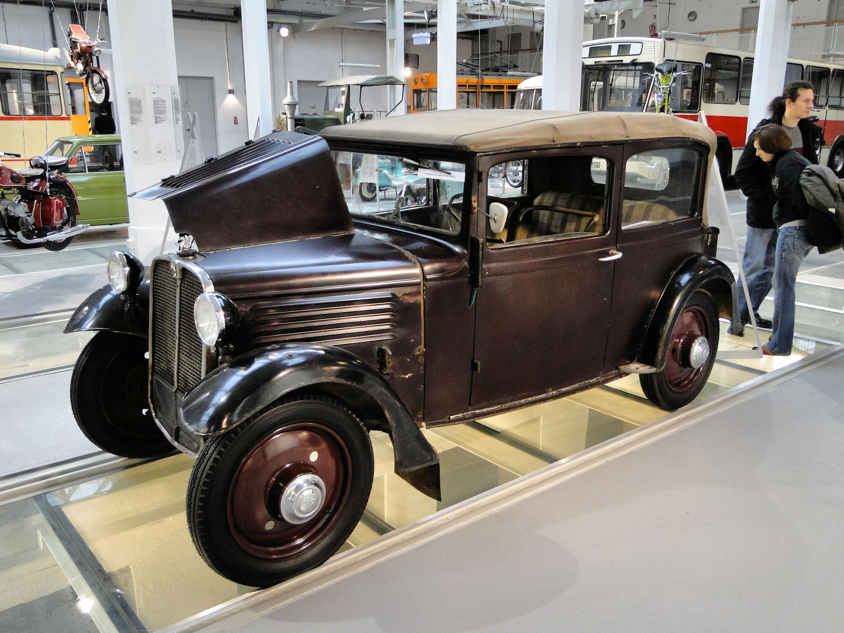 Samochód Stoewer V5, eksponowany w Muzeum Techniki i Komunikacji w Szczecinie